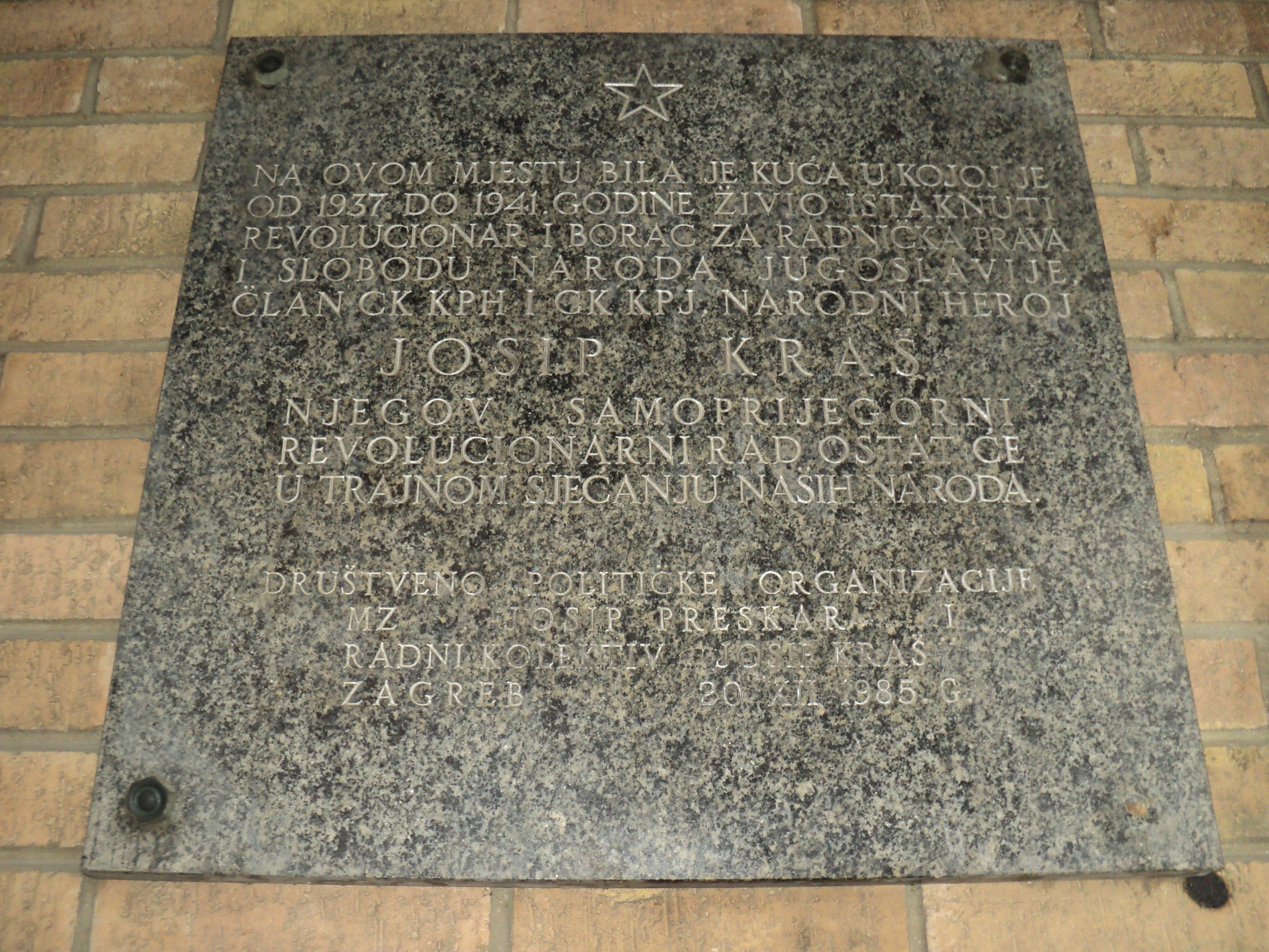 Spomen-ploča na mjestu kuće u Zagrebu (Petrova ulica) u kojoj je od 1937. do 1941. živio sekretar CK KPH i narodni heroj Jugoslavije Josip Kraš.